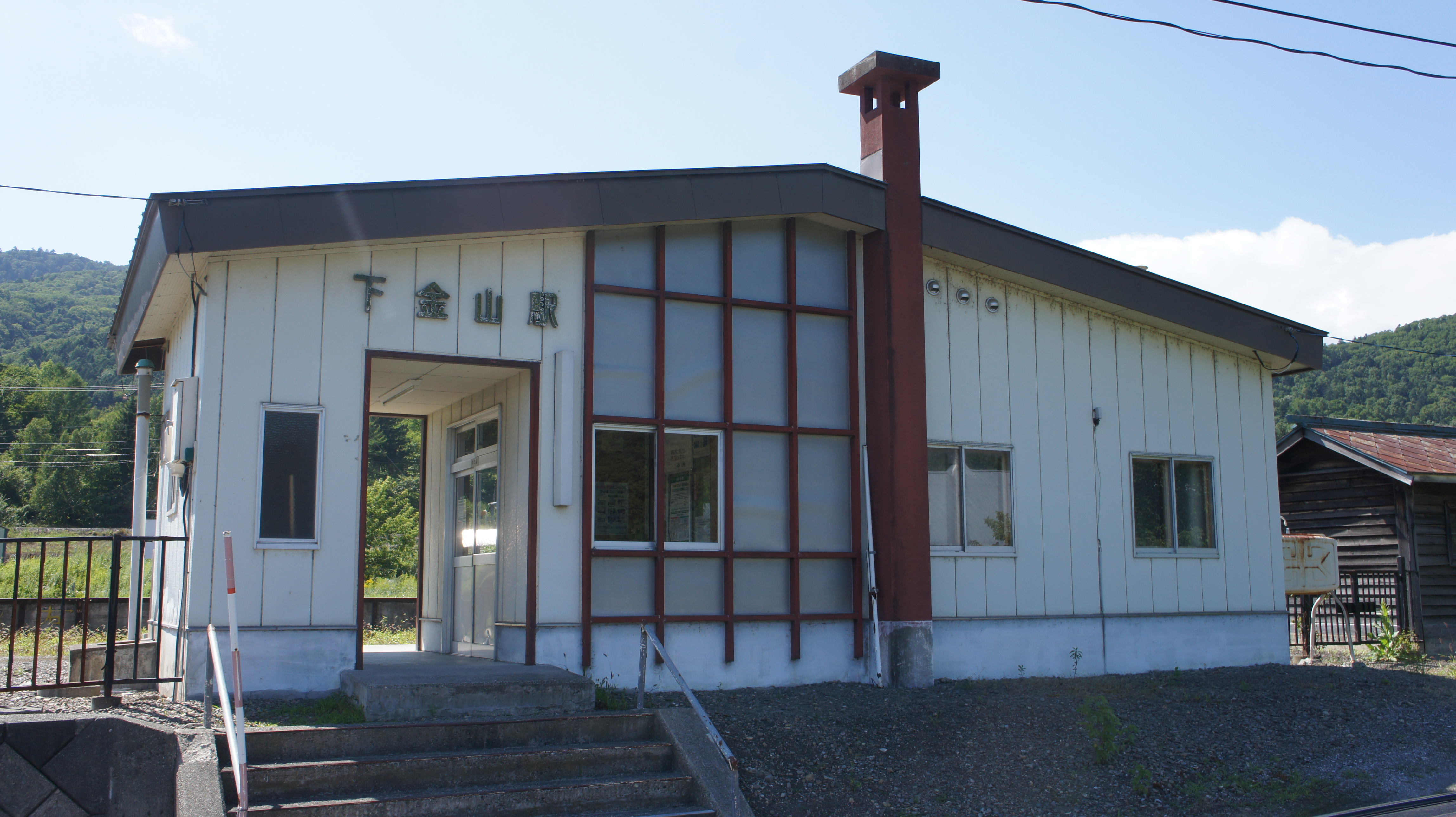 JR根室本線・下金山駅の駅舎